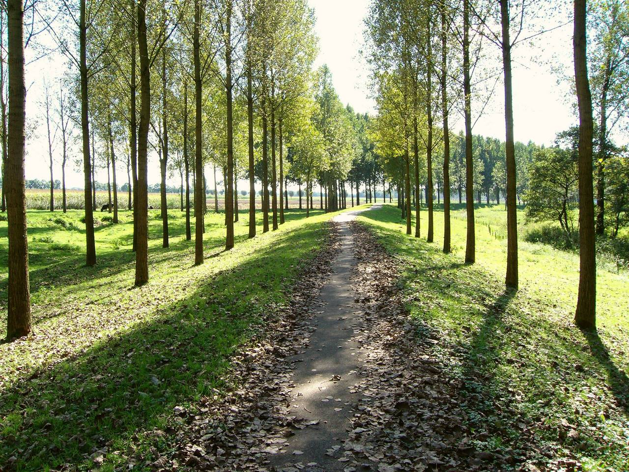 Haagse Dijk, northwest of Breda